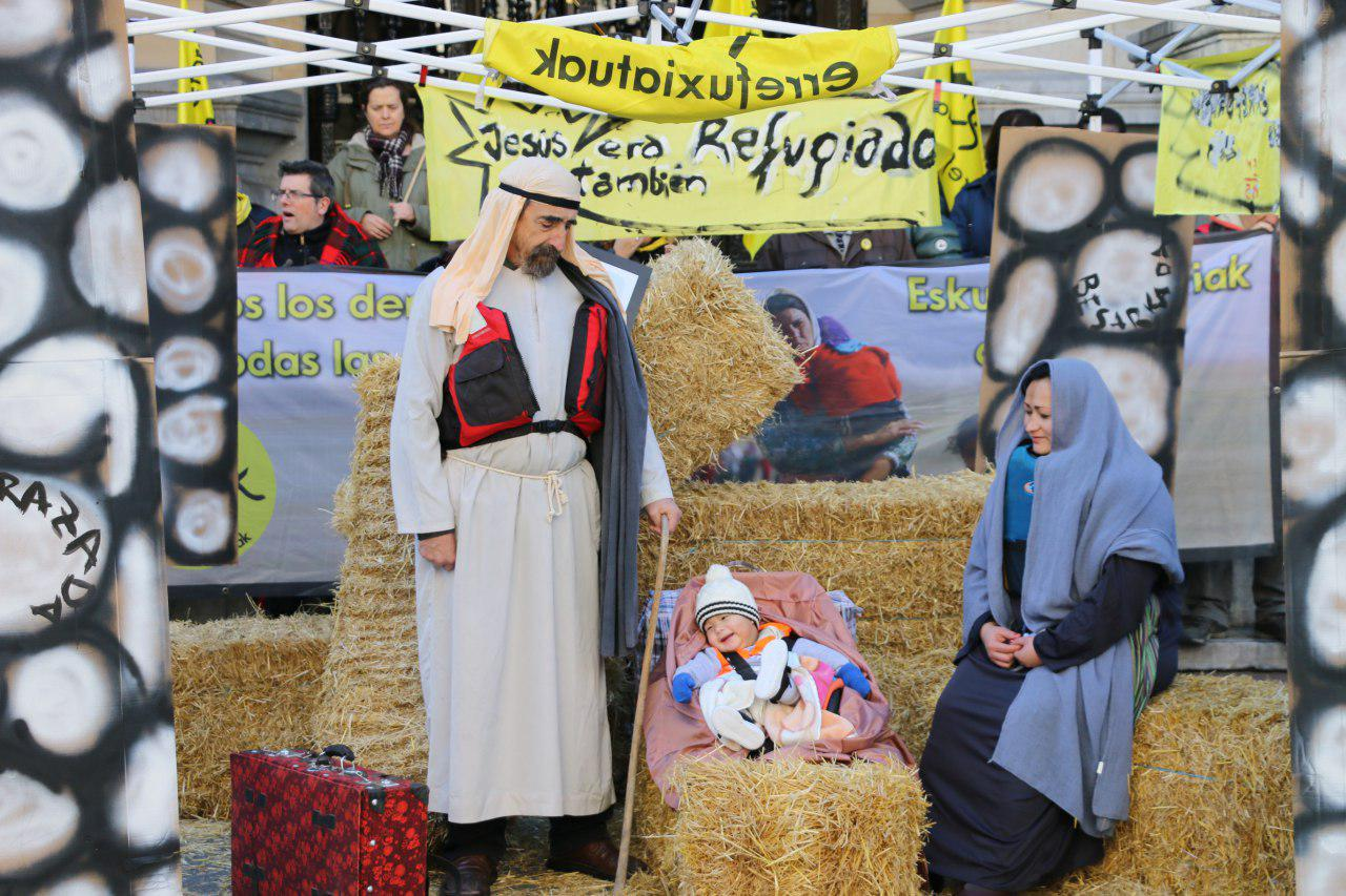 Urtarrilak 5 eegindakoa 5M5